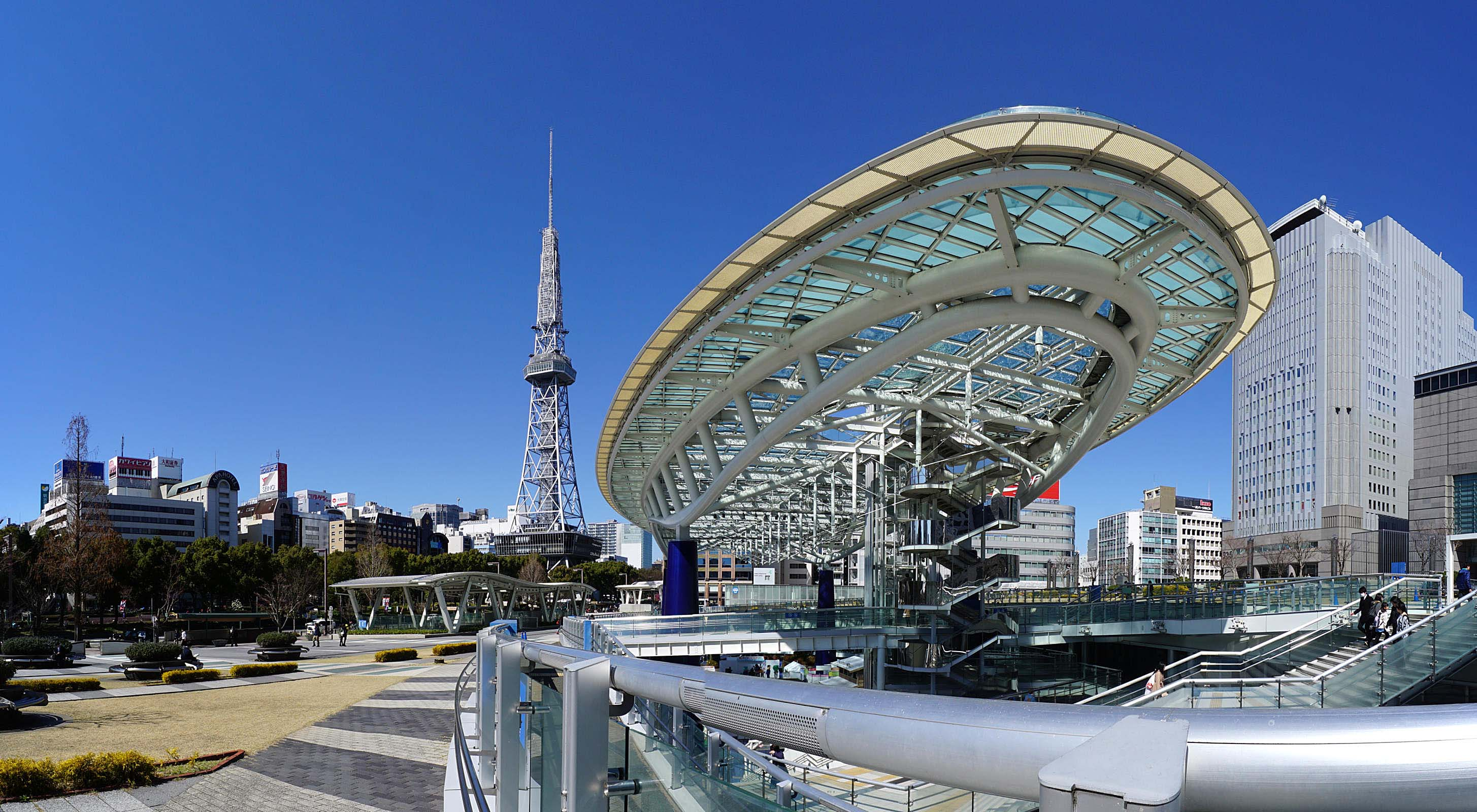 OASIS 21 / オアシス21